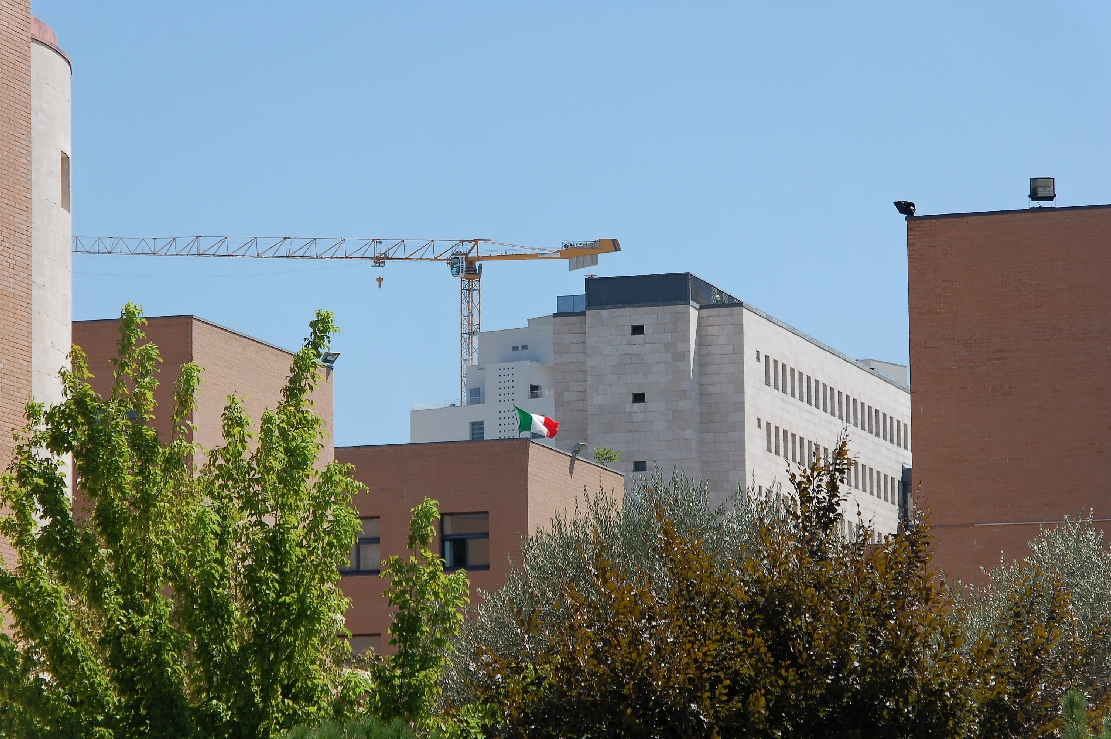 Chieti 2011